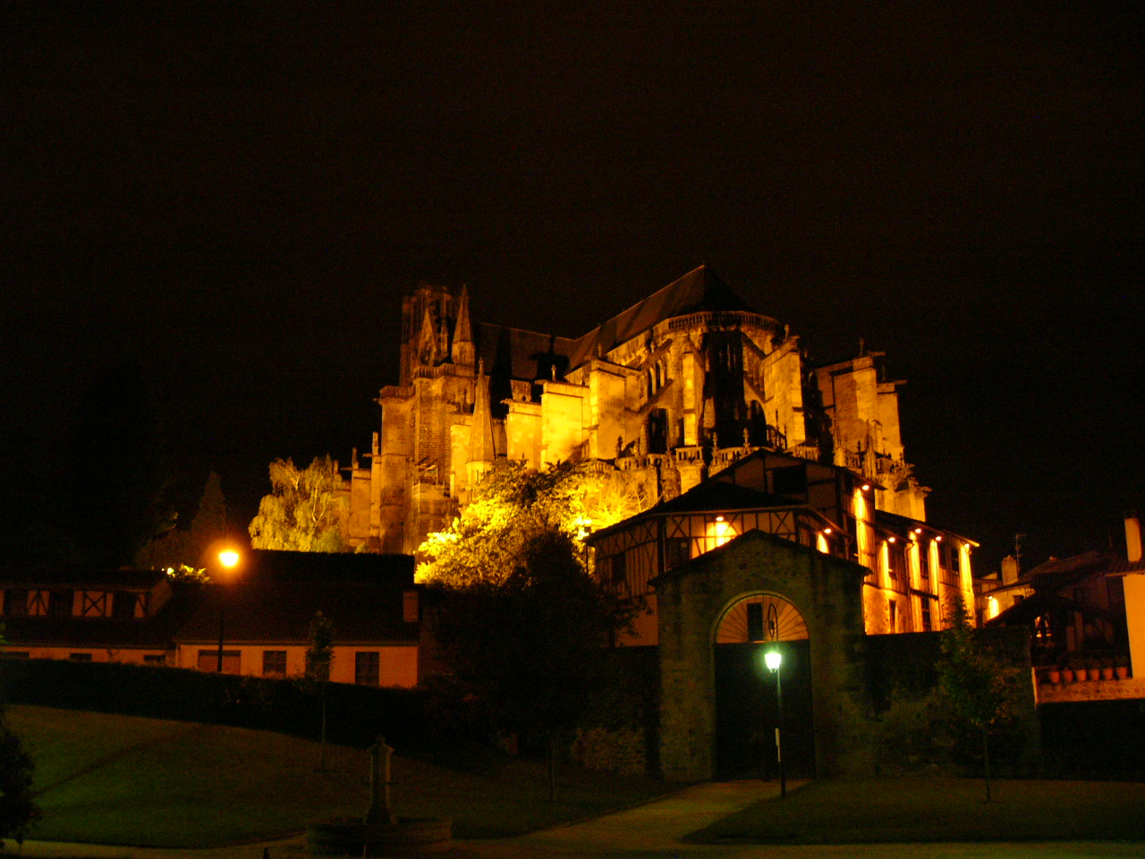 La cathédrale Saint-Etienne de Limoges (Haute-Vienne, France) de nuit.